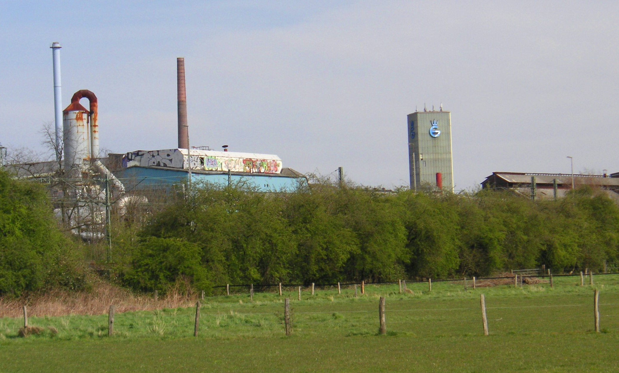 Gerresheimer Glashütte im Jahre 2008